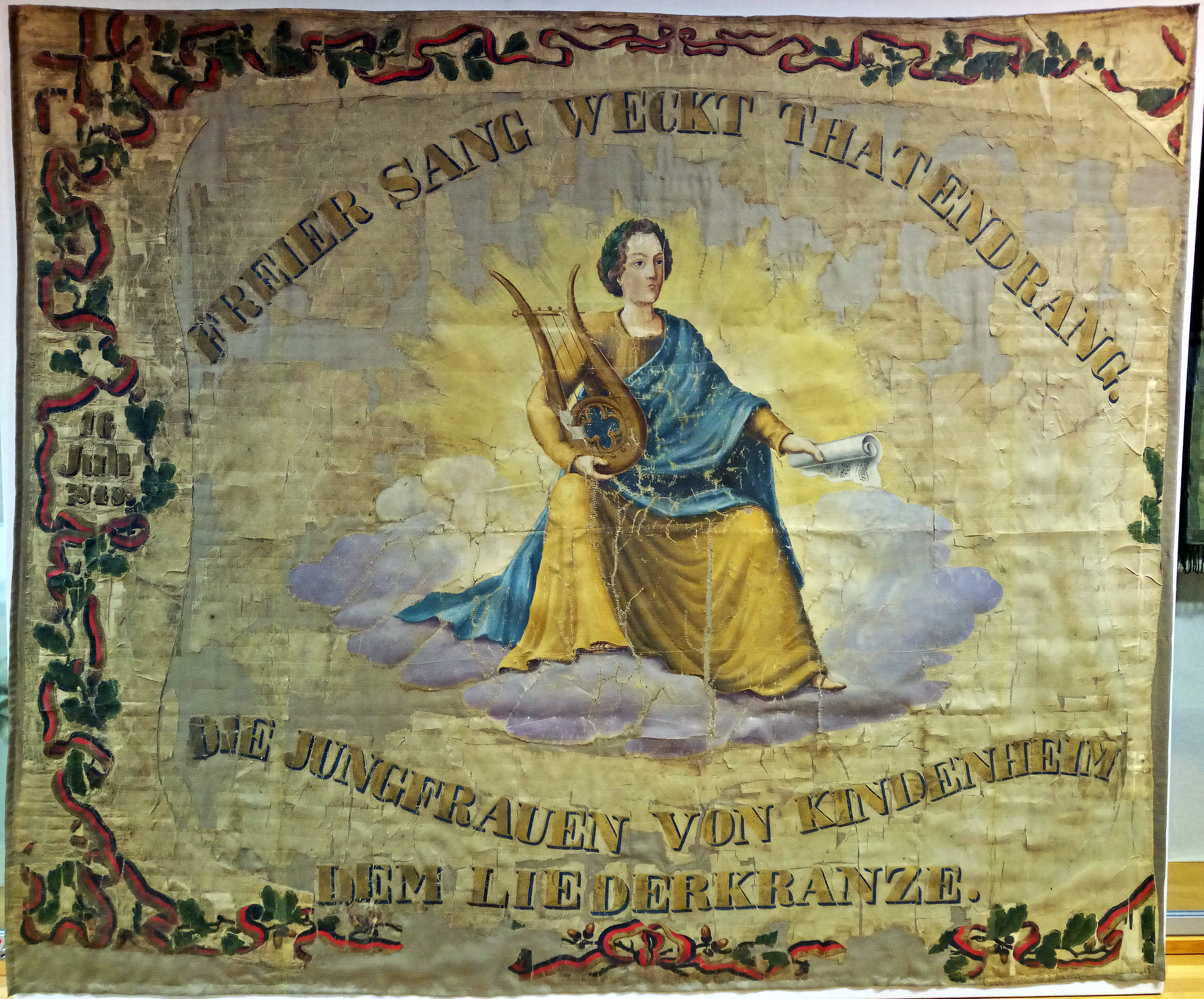 Fahne Gesangverein Kindenheim, von 1848, heute Stadtmuseum Grünstadt